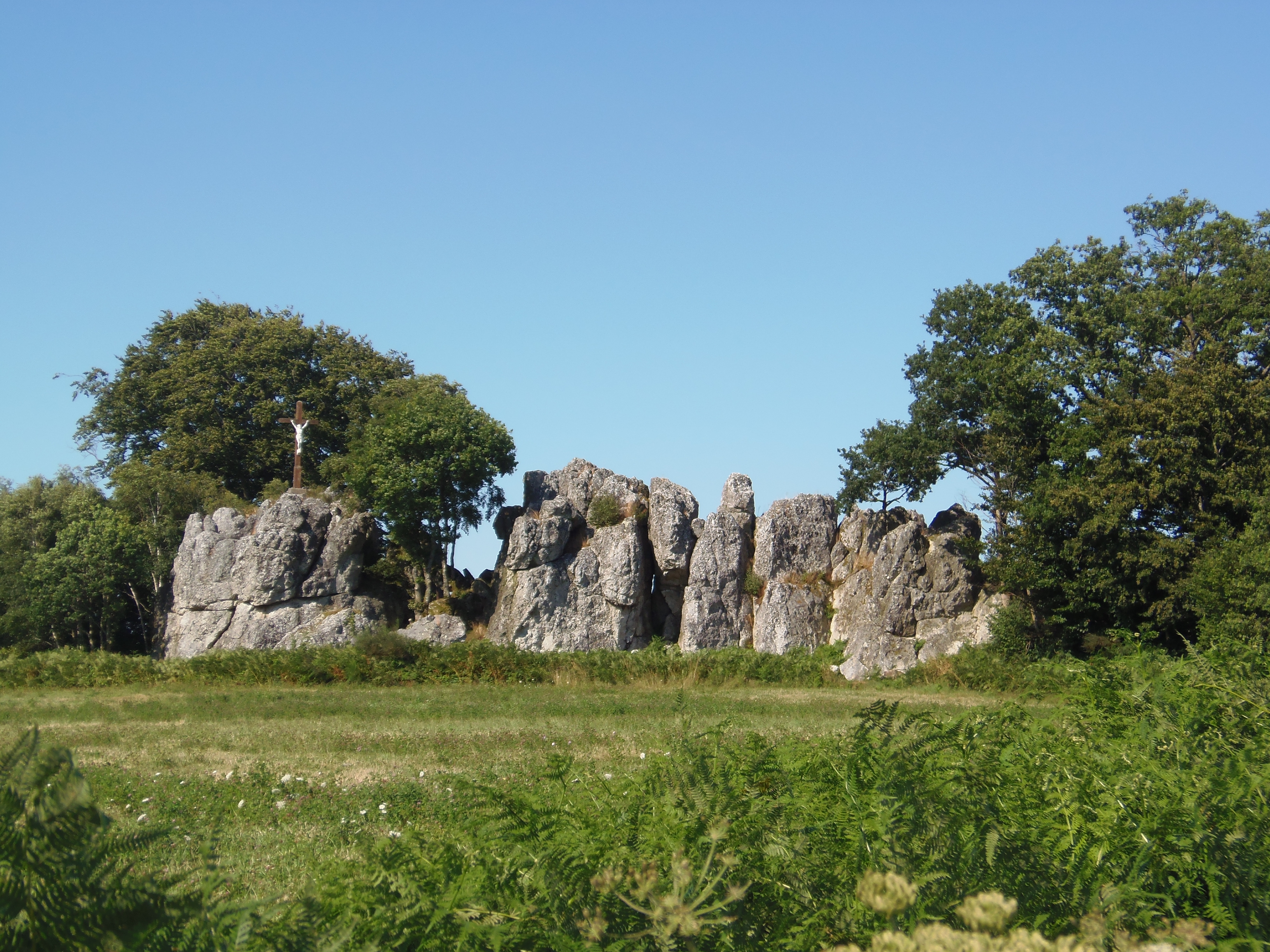 Lignières-Orgères (Pays de la Loire, France). Les roches d'Orgères.